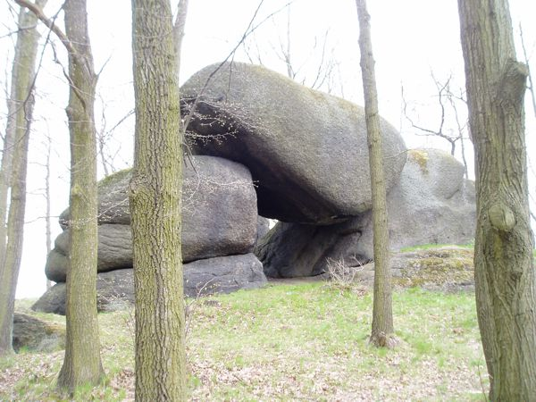 Pohanské kameny bei Višňová mutmaßliches Sonnenheiligtum mit einem Tor zur Beobachtung der Sonnenwenden (Sommersonnenwende Sonnenuntergang und Wintersonnenwende Sonnenaufgang)